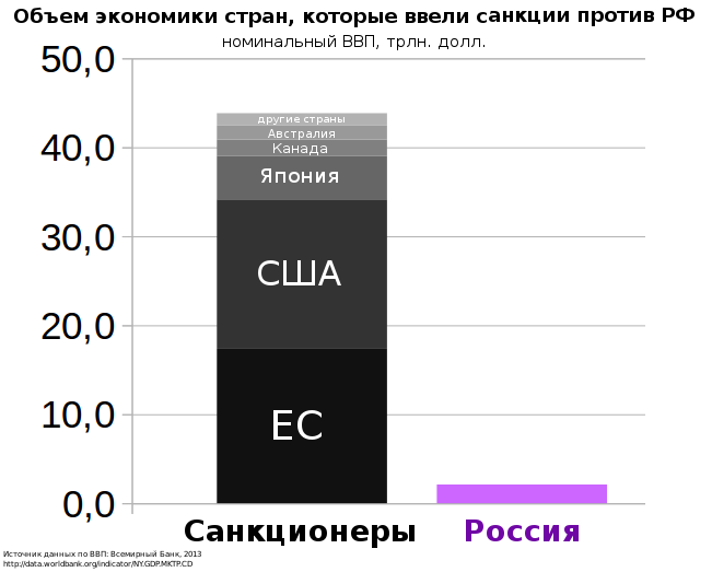 Объем экономики стран, которые ввели санкции против РФ. Номинальный ВВП, трлн. долл. Источник данных по ВВП: Всемирный Банк, 2013 Список стран-санкционеров: ЕС США Япония Канада Австралия Другие страны: Украина, Новая Зеландия, Швейцария, Израиль, Норвегия, Исландия, Албания, Молдавия, Республика Косово, Черногория.